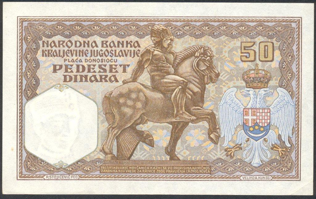 50 Yugoslav dinars note (1929 dinar) back